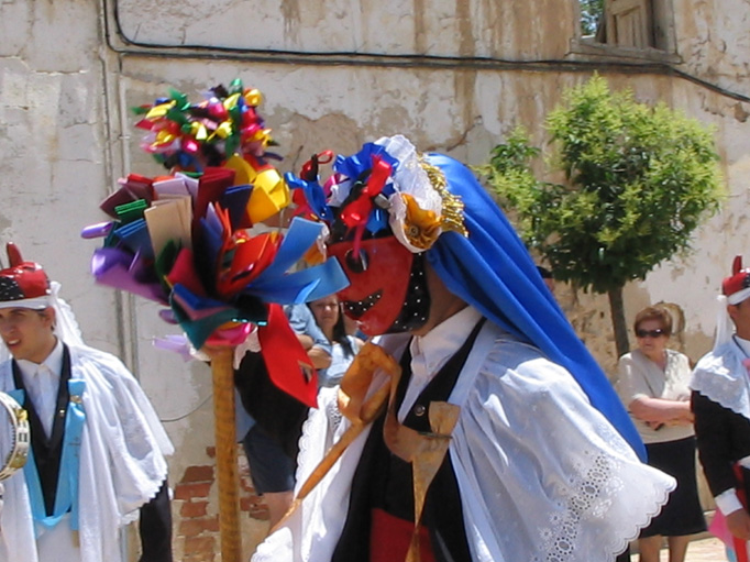 Pecados y Danzantes, in Camuñas (Spain)